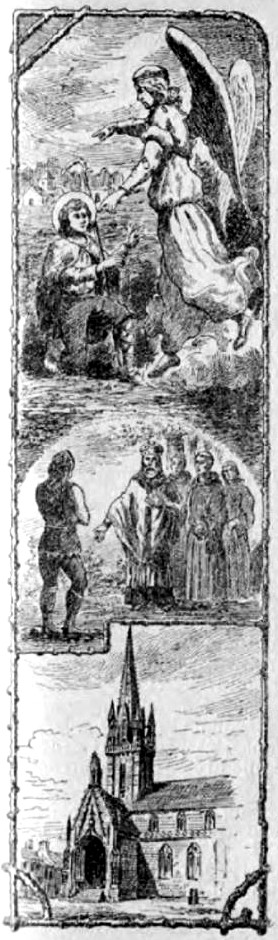 Image de la page 499 de la "Vie des Saints" en langue bretonne. Écrit par Yann-Vari Perrot et publié en 1912.